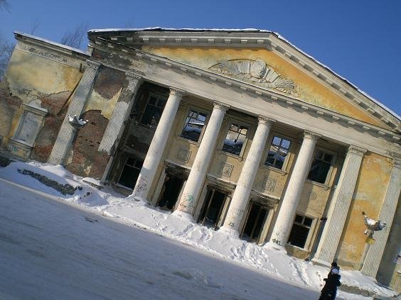 фотография разрушенного взрывом ДК Железнодорожников на Сортировке (г. Екатеринбург)